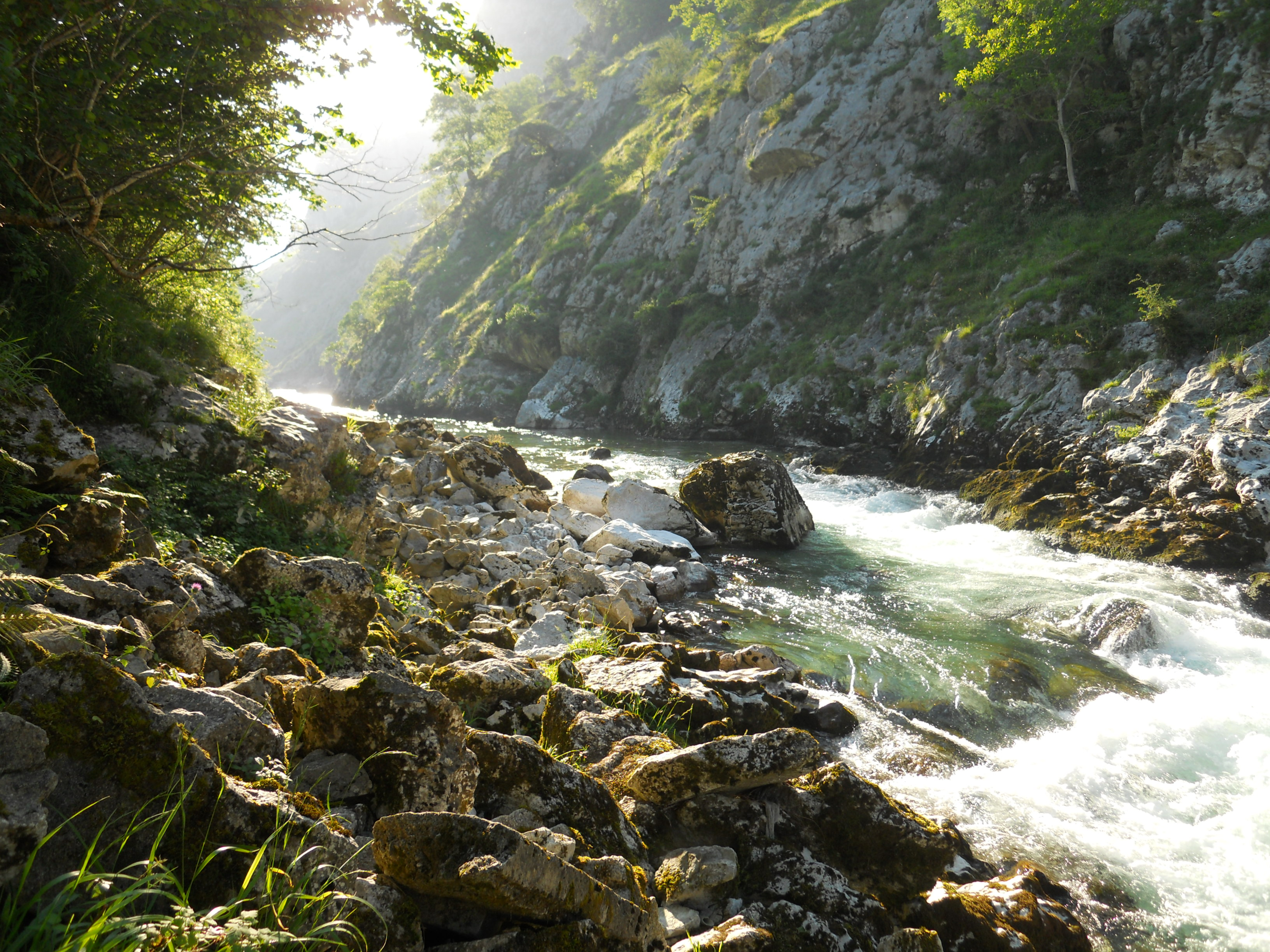 Río Cares-Deva This is a photography of a Special Area of Conservation in Spain with the ID: ES1200035. Natura2000 entry, EEA entry